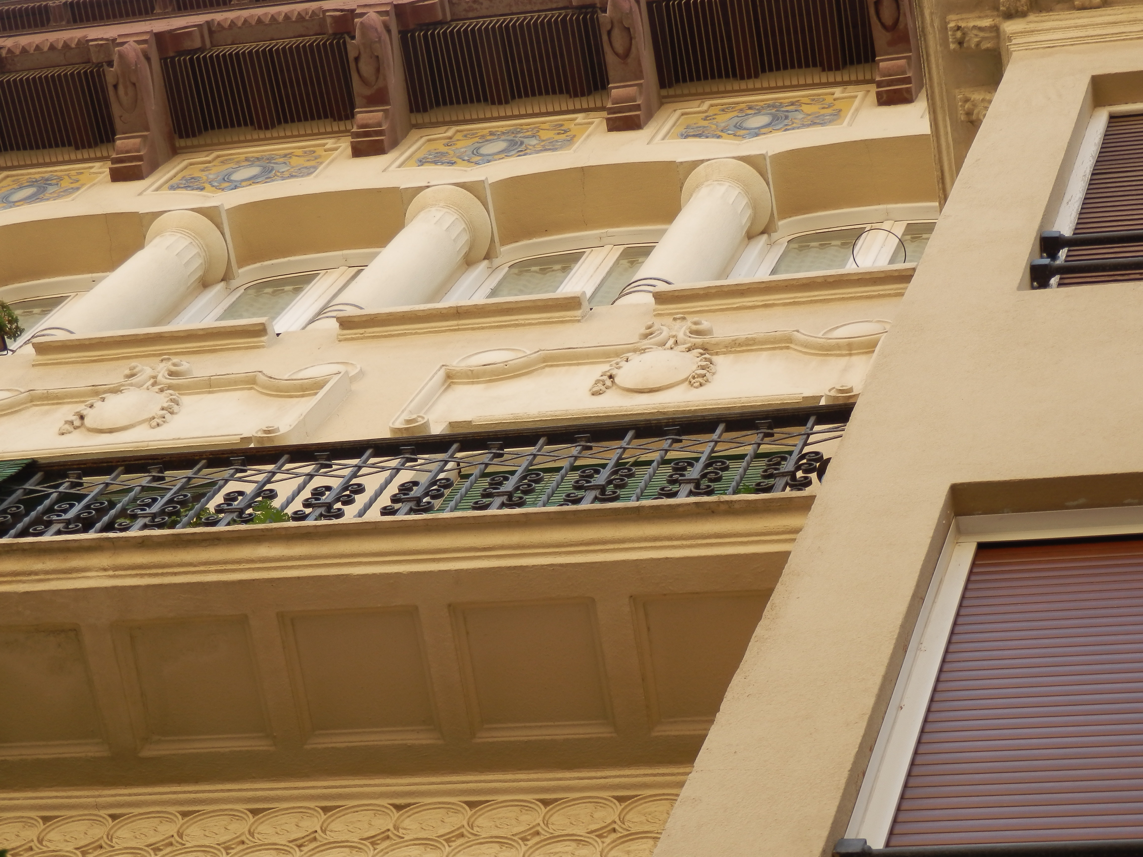 Edificio de viviendas situado en la calle Almagro, 5, de Zaragoza, España. Es bien de interés cultural (BIC) de la provincia de Zaragoza.